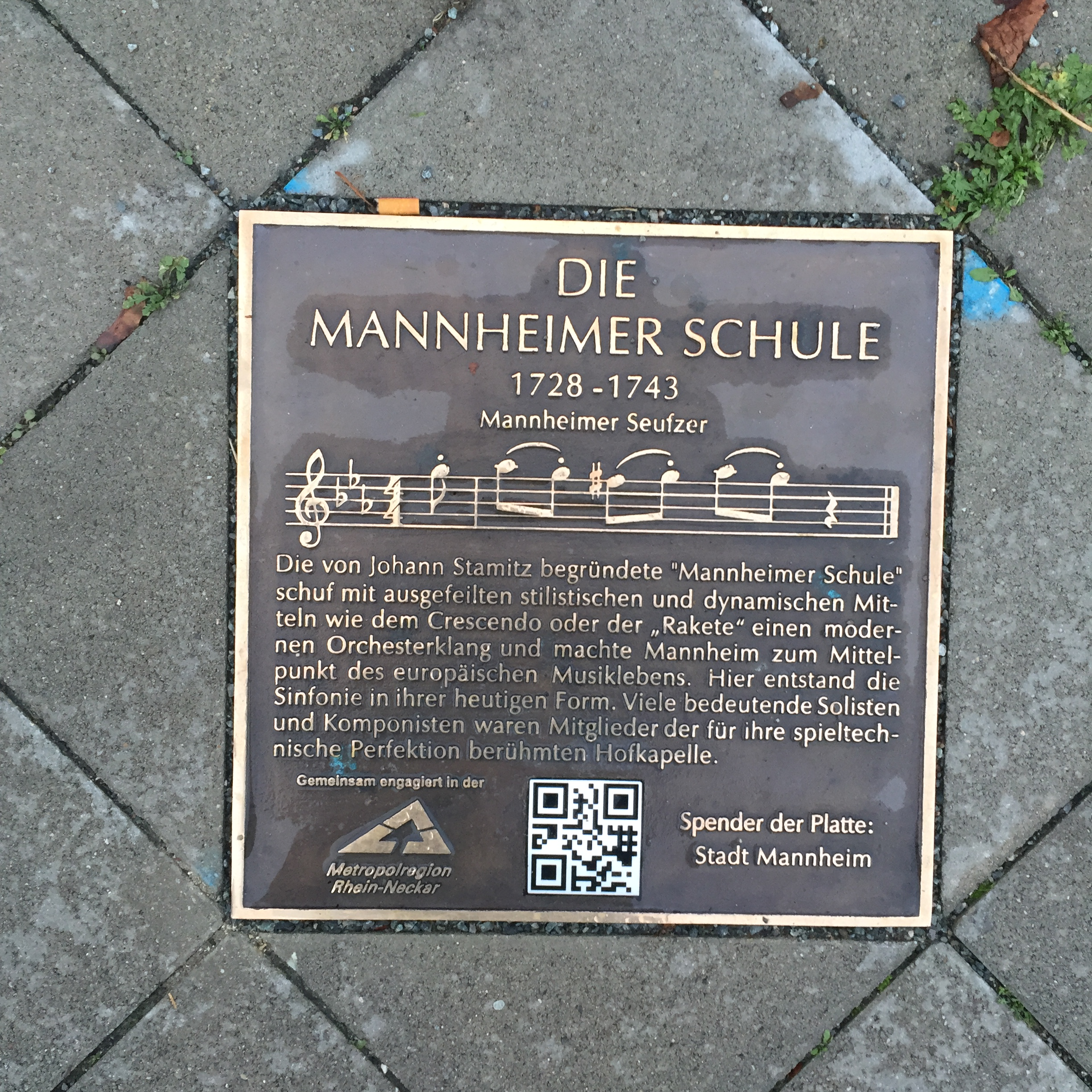 Kurpfälzer Meile der Innovationen. Plakette Mannheimer Schule